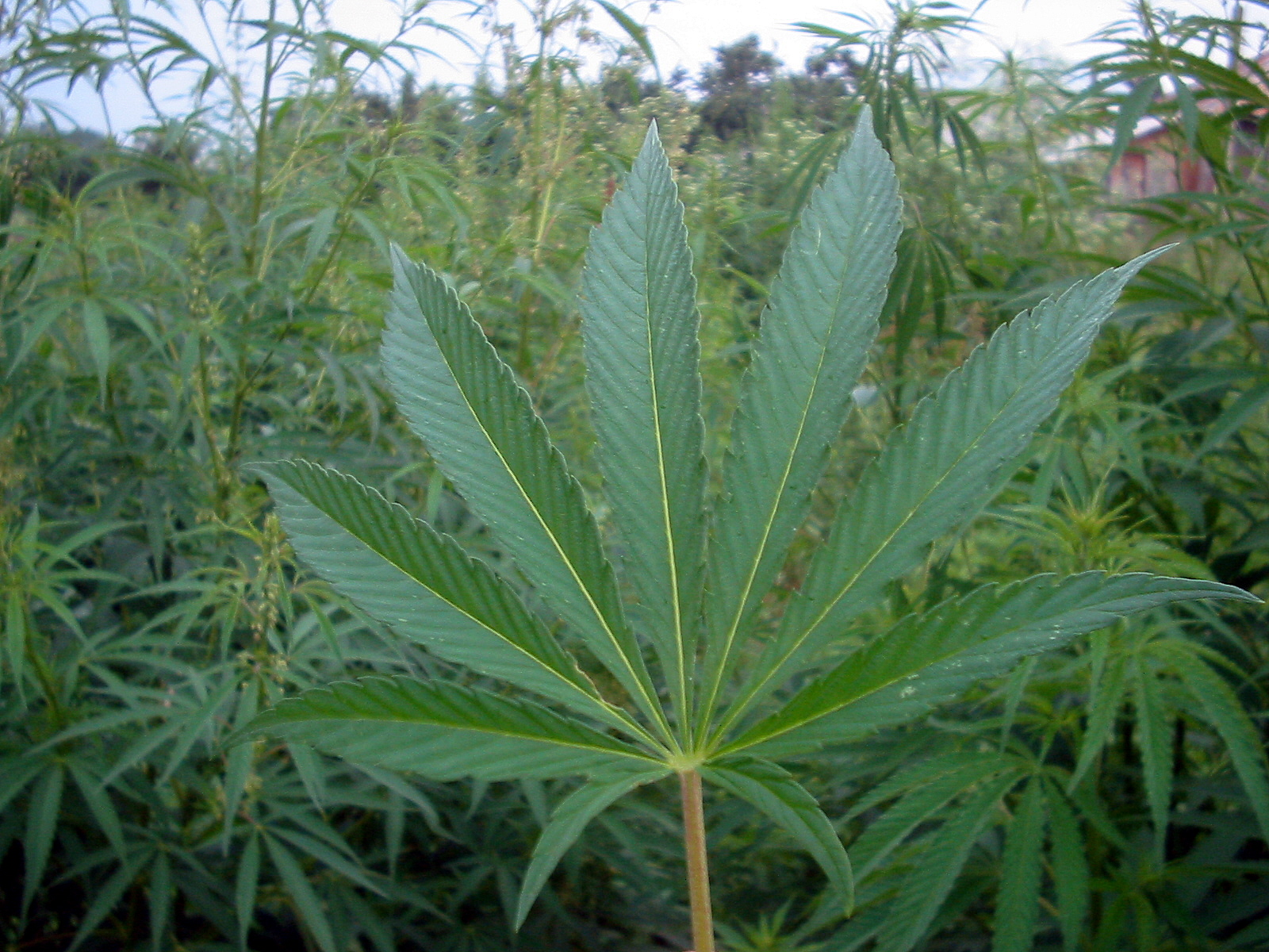 Cannabis sativa